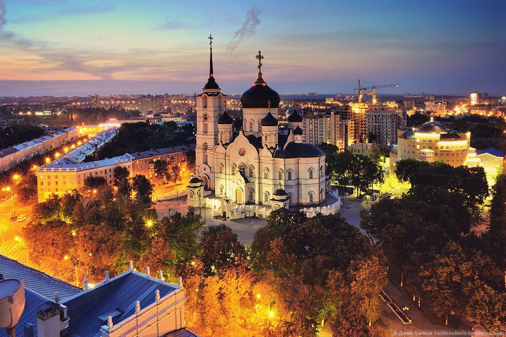 Благовещенский собор на закате